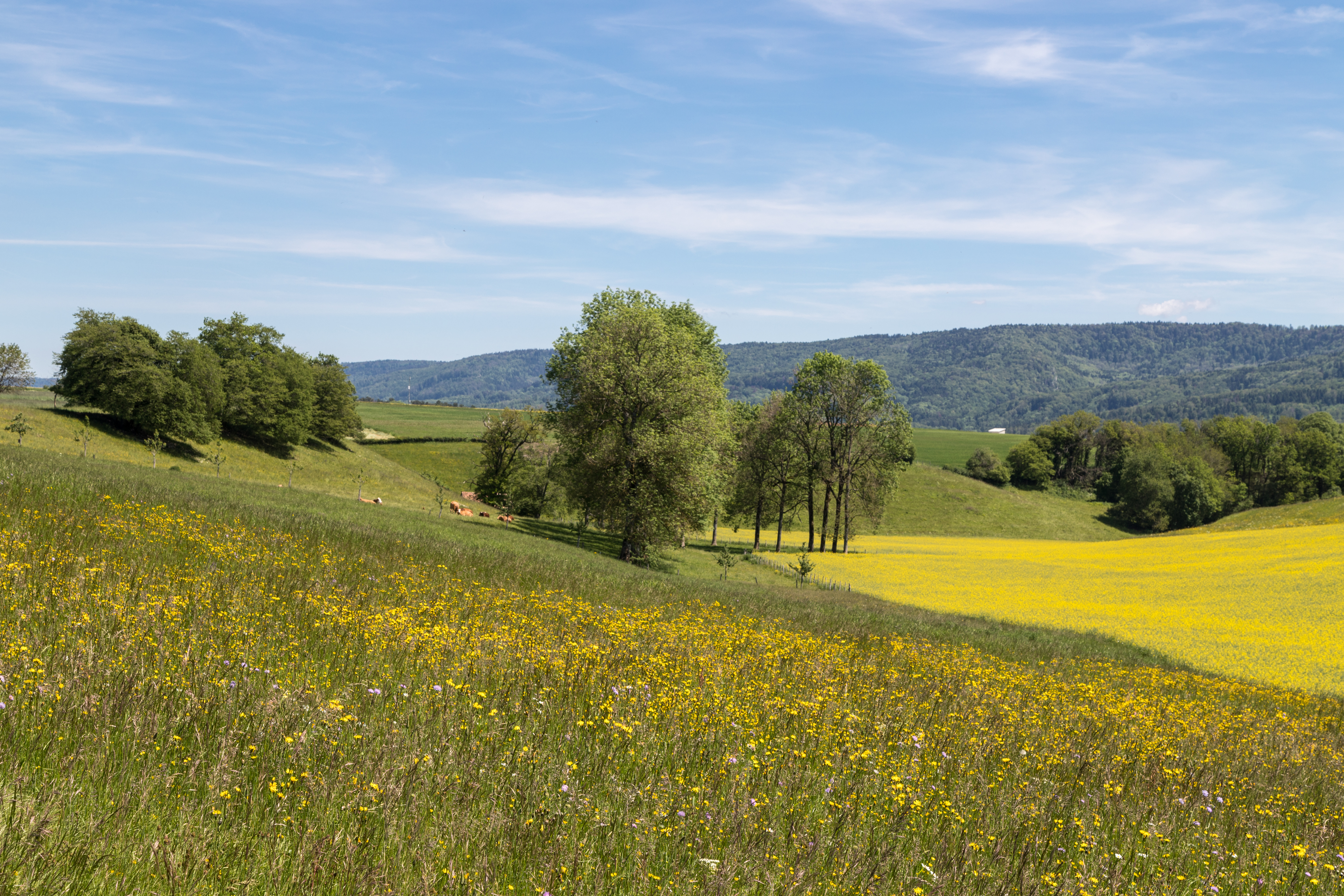 Ajoie-Landschaft zwischen Fahy und Grandfontaine, Kanton Jura, Schweiz